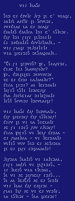 Ekzemplo pri eo-teksto («Mia penso» de L.L. Zamenhof) en la Ŝava alfabeto